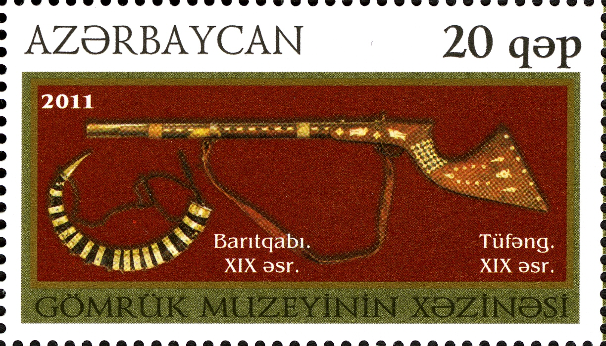 Gömrük Muzeyinin xəzinəsi